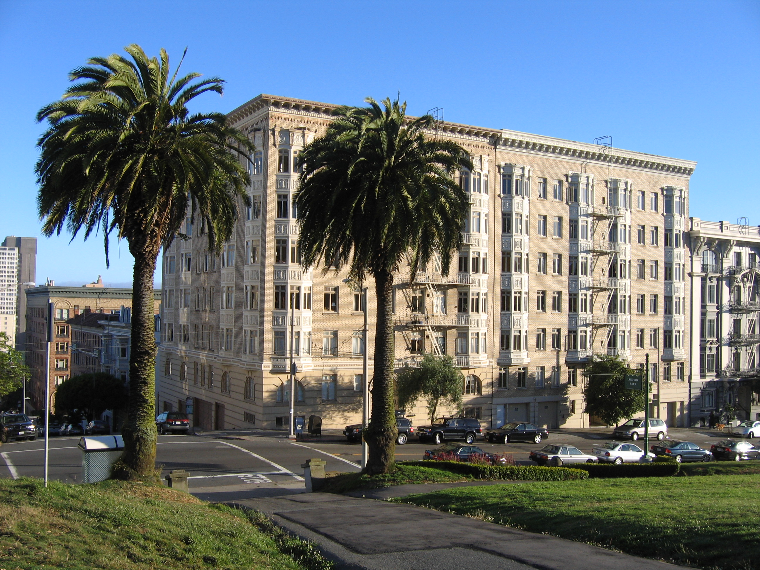 Гледка от Лафайет парк в Сан Франциско към улицата.